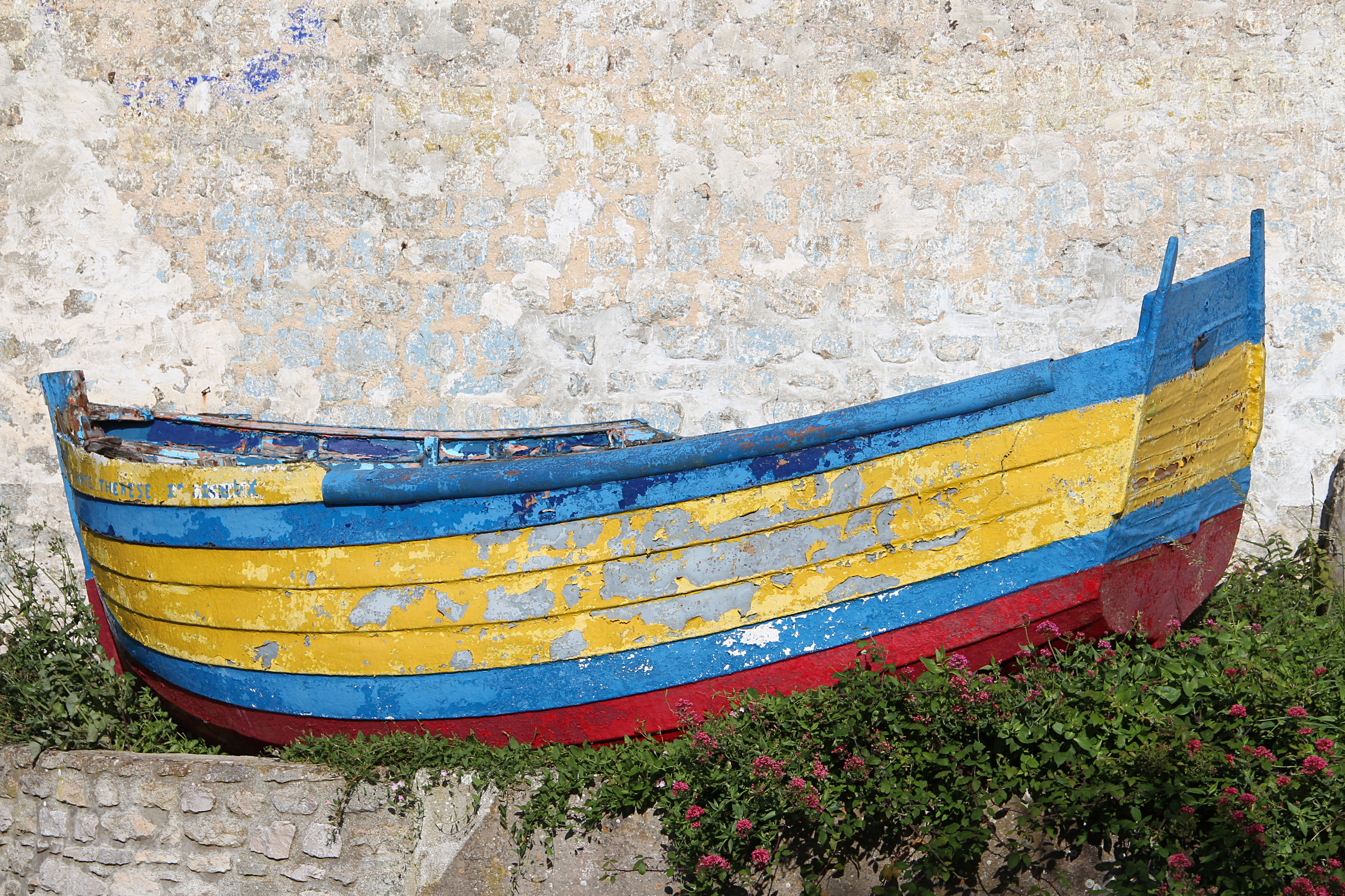 Le Flobart "Sainte Thérèse de Lisieux" à Tardinghen, Pas-de-Calais (France).